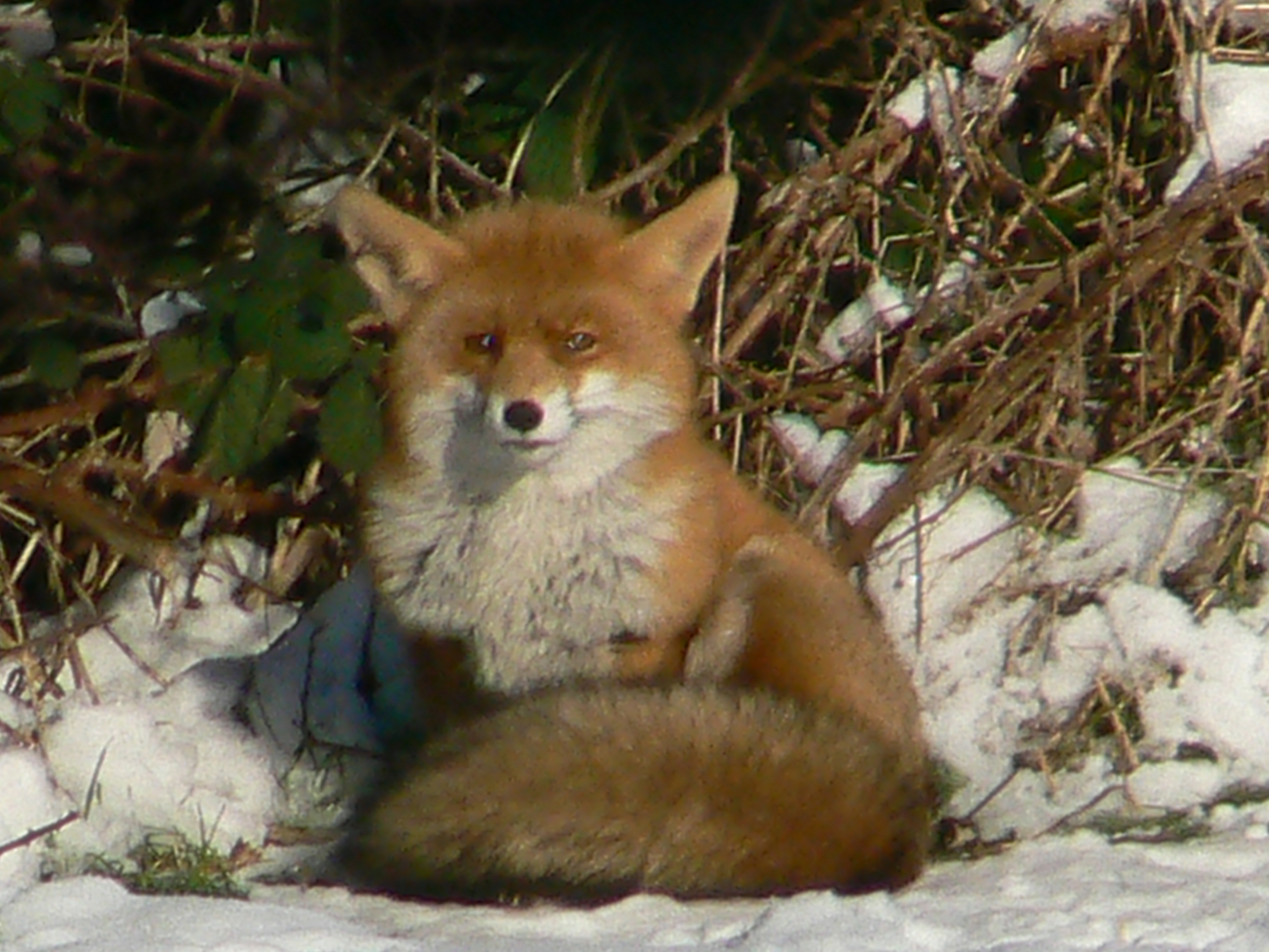 Rotfuchs in Lohausen, Düsseldorf